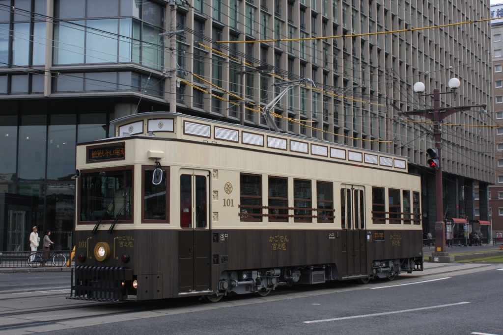 鹿児島市電100形101